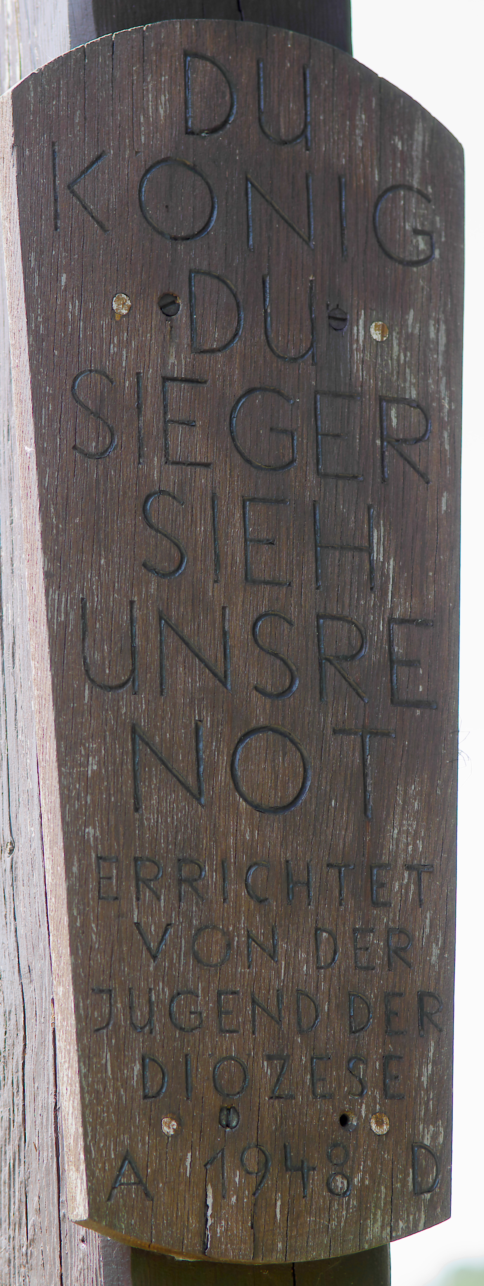 Die Inschrift des Wallfahrtkreuzes von Georg Schröter von 1948 auf dem Kreuzweghügel des Klosters Neuzelle